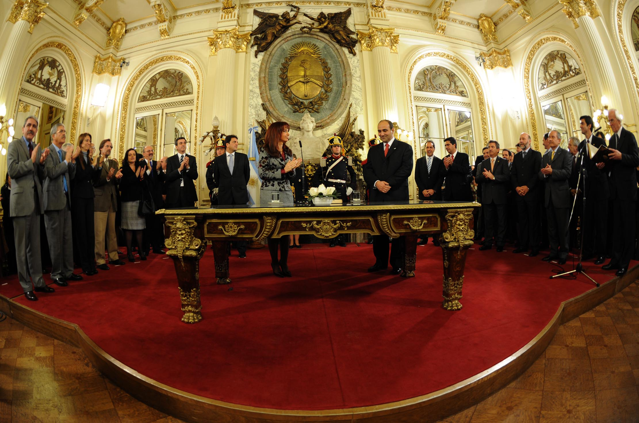 Acto de asunción de Juan Luis Manzur al cargo de Ministro de Salud de la República Argentina.